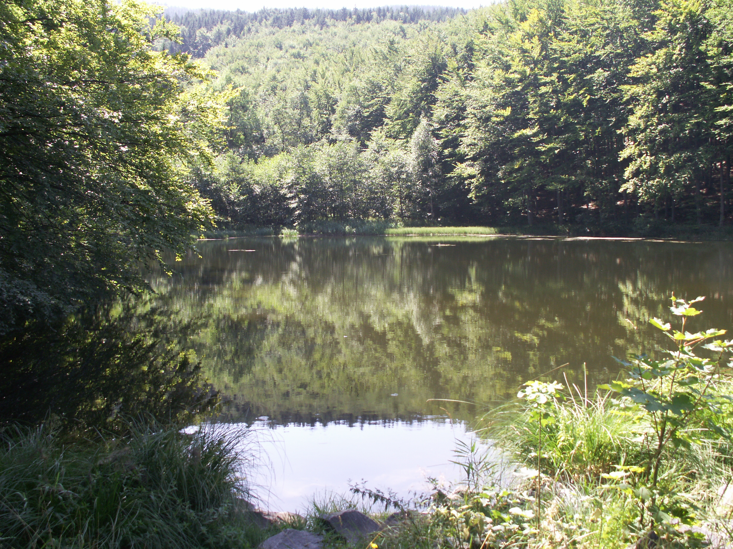 Přírodní památka Černé jezero u Zlatých Hor, okres Jeseník, Olomoucký kraj, horní jezírko (jižní)